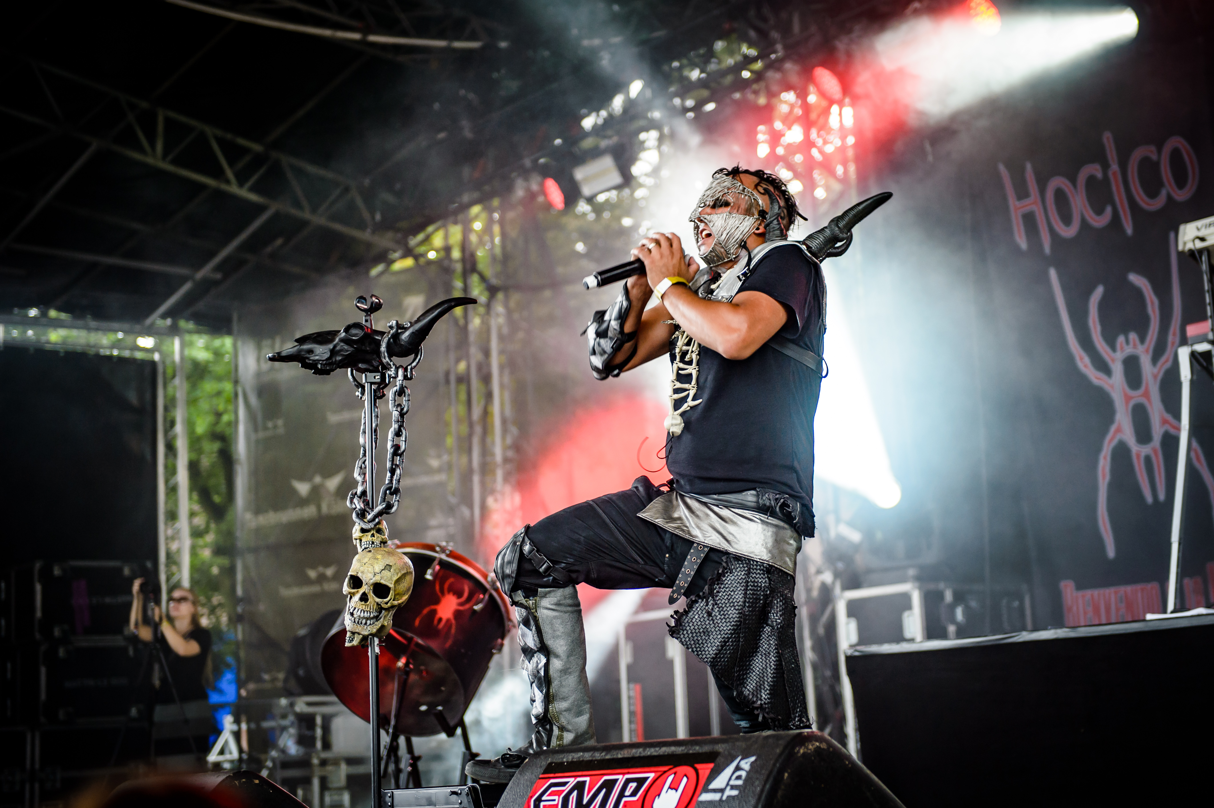 'Amphi Festival 2017; Tanzbrunnen Köln': 'Hocico'